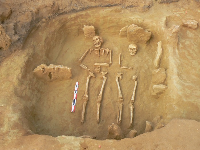 Nécropole Mérovingienne du Brigandin